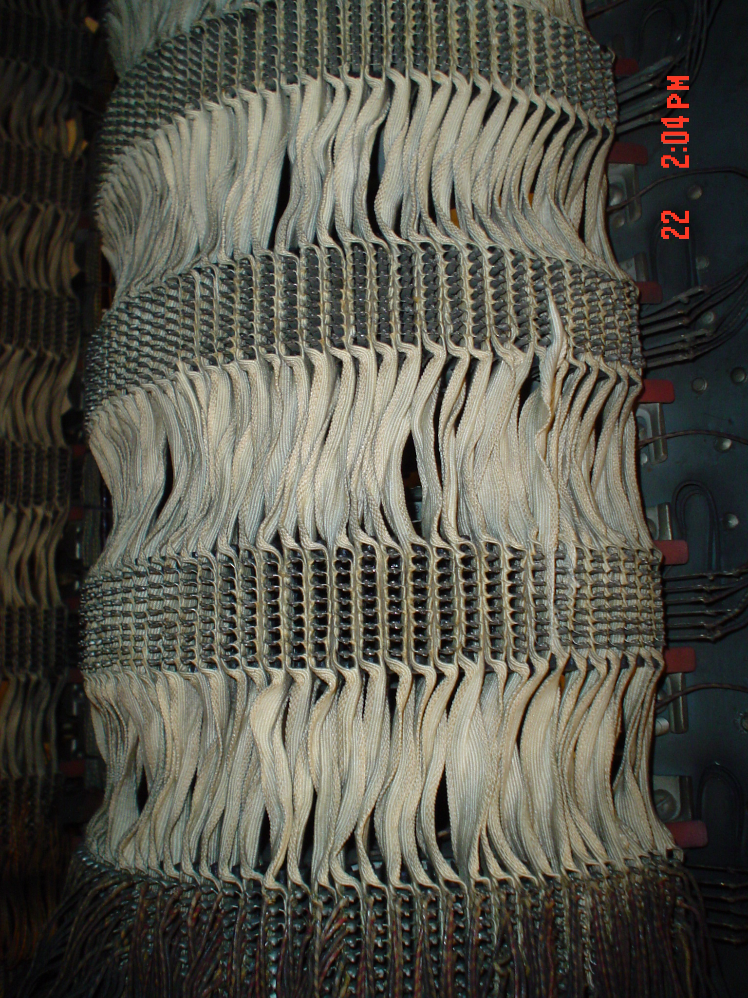 Rubandaj kabloj. La vertikalaj blankoj estas apartaj rubandaj kabloj. En ĉi tiu kablo troviĝas 4 maldikaj konduktiloj. Ĉi tie ĉiu kablo interligas po 1 abonulon al aŭtomataj maŝinoj.